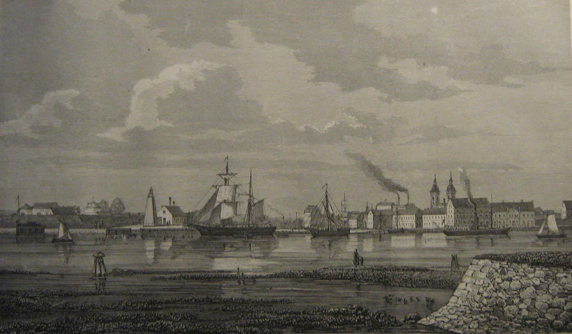 Xylografi